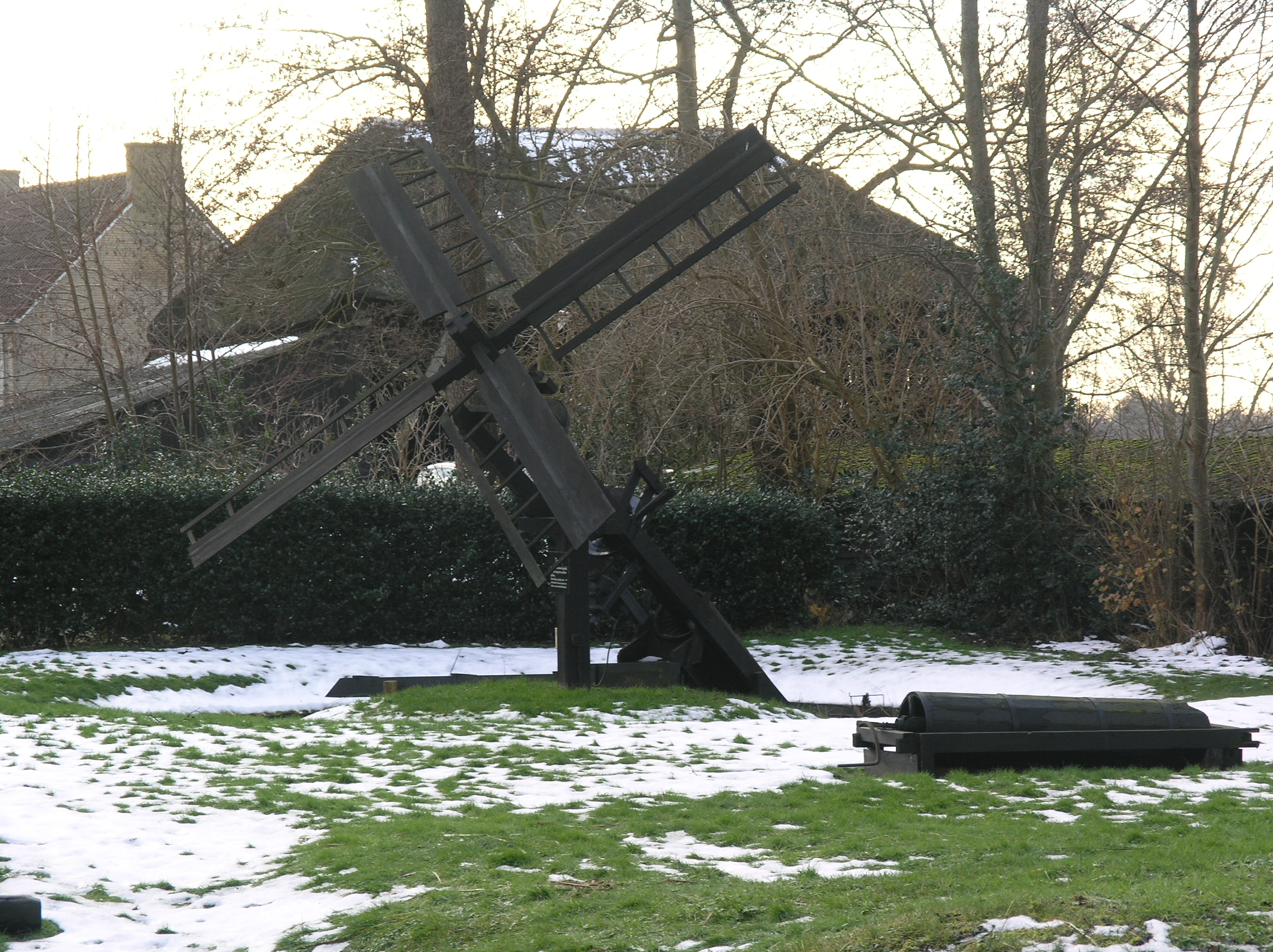 Giethoorn Tjasker Zuid